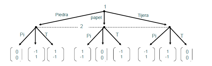 Este árbol de decisión representa el juego 'piedra, papel o tijera' y las diferentes opciones que pueden elegir sus jugadores